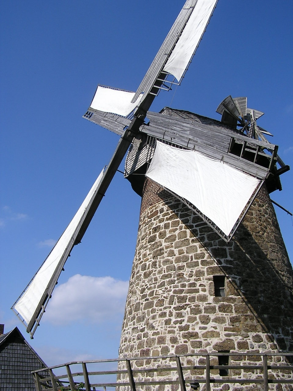 Mühlenkreis Minden Lübbecke, Windmühle Eilenhausen, besegelt und drehend.